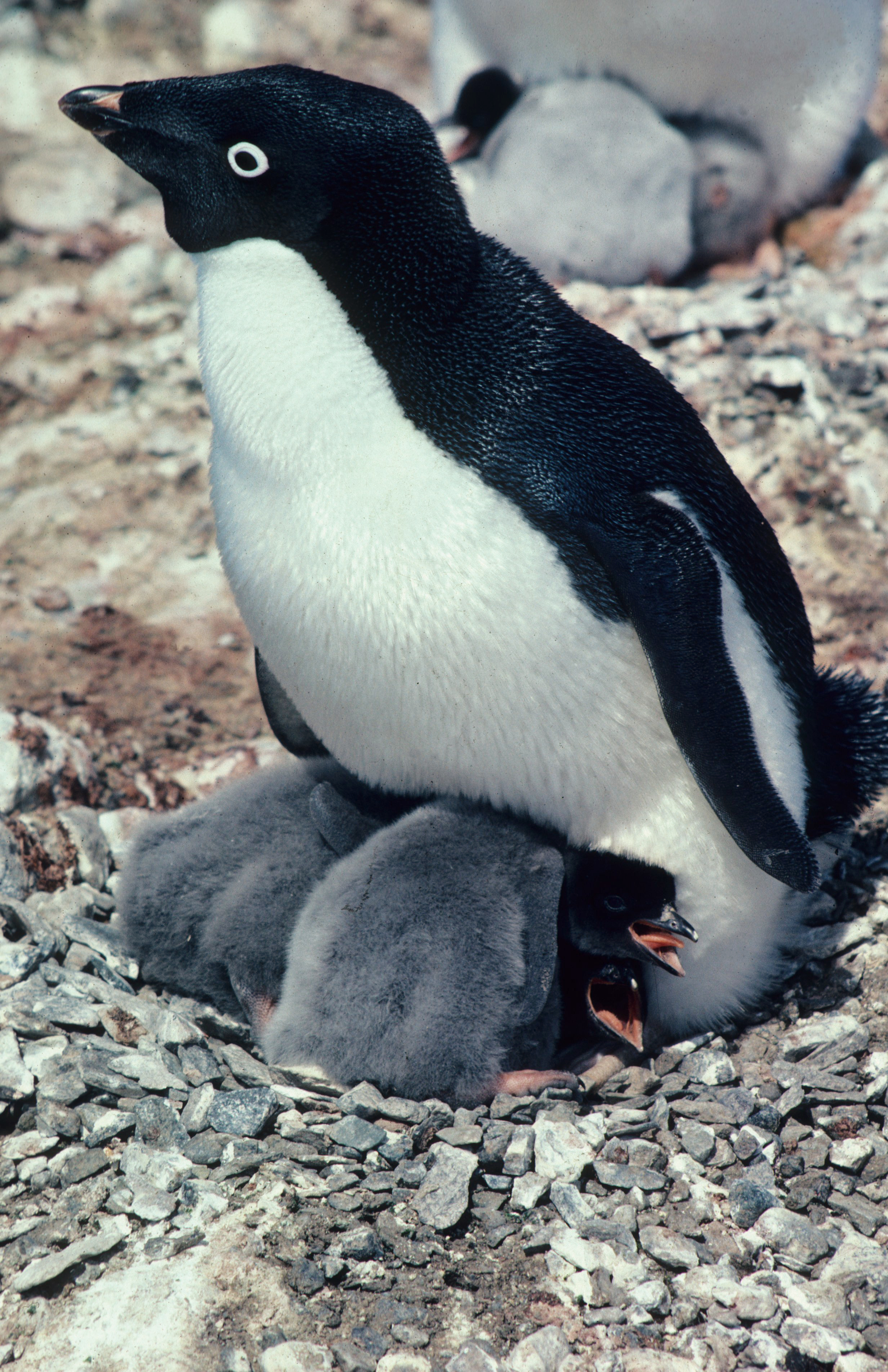 Pygoscelis adeliae